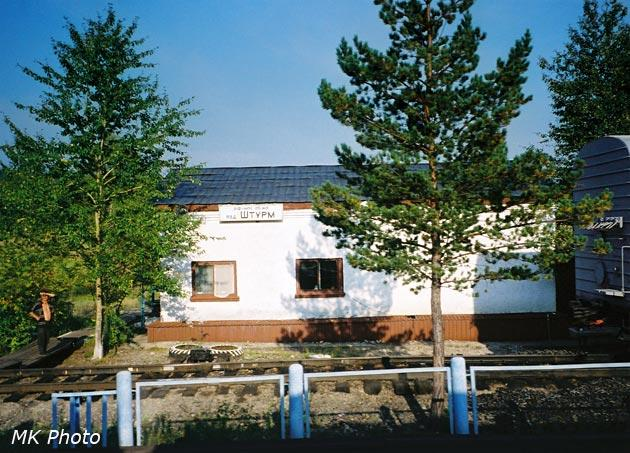 Железнодорожный разъезд Штурм